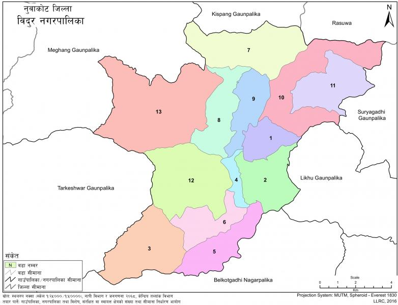 नेपाली